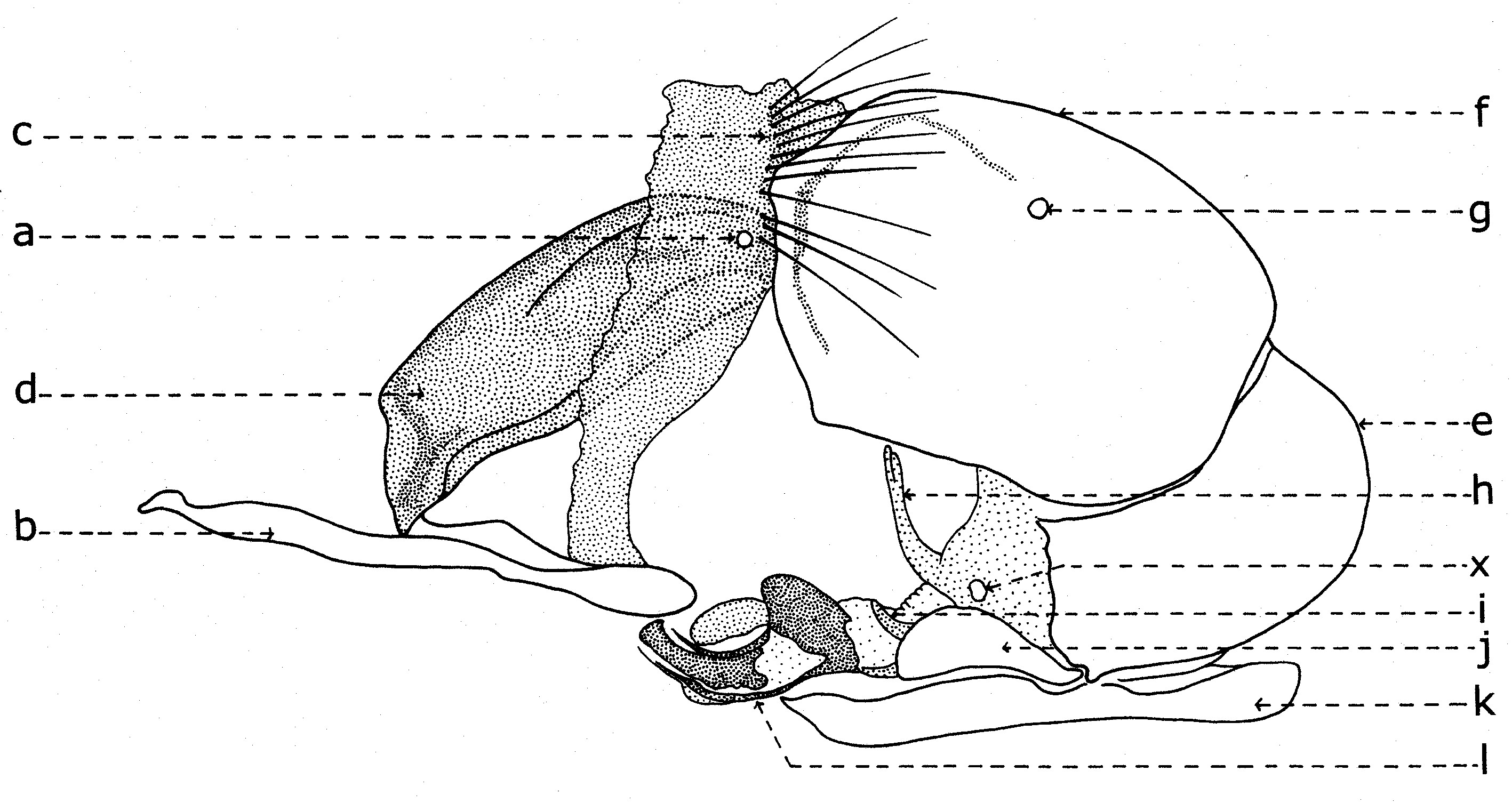 Fig. 12. Postabdomen de Sarcophaga carnaria Bottcher, 1912.